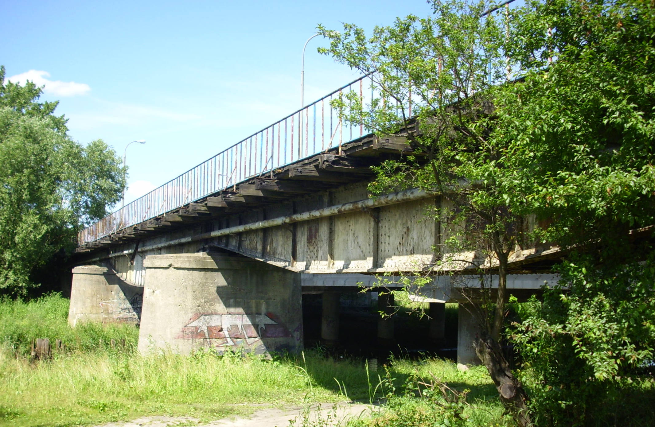 Biała Podlaska. Most wąskotorowej Bialskiej Kolei Dojazdowej nad Krzną – tuż obok mostu w ciągu ul. Jana Pawła II. Zbudowany w roku 1956, obecnie nieużywany i zamknięty dla wszelkiego ruchu.